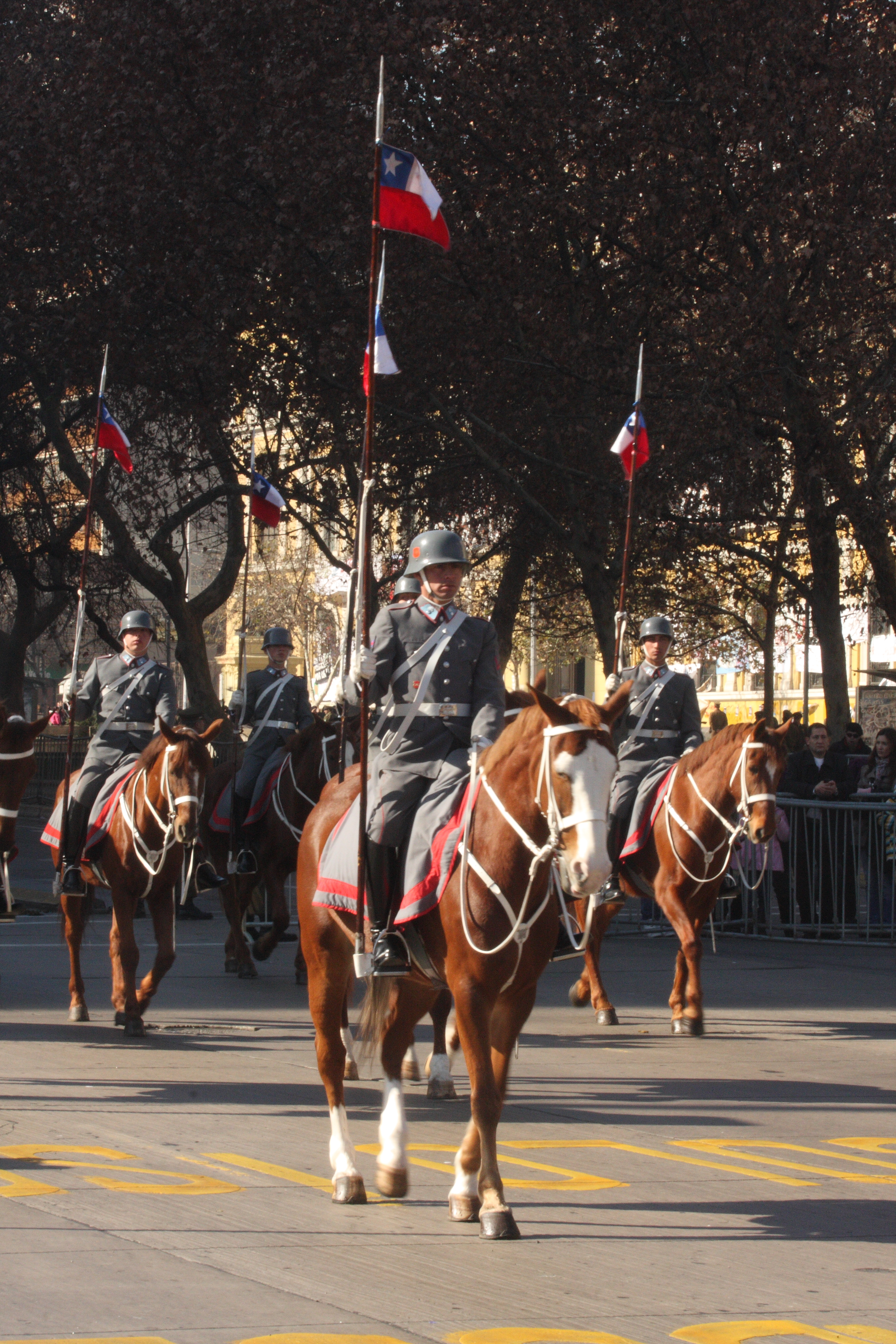 El batallón de Granaderos del Ejército de Chile, que son quienes acompañan al Presidente de la República en actos formales, como por ejemplo, la Cuenta Anual del 21 de Mayo. En esta foto llevan todavía el antiguo uniforme plomo reemplazado con la reforma del 2011 por el histórico original